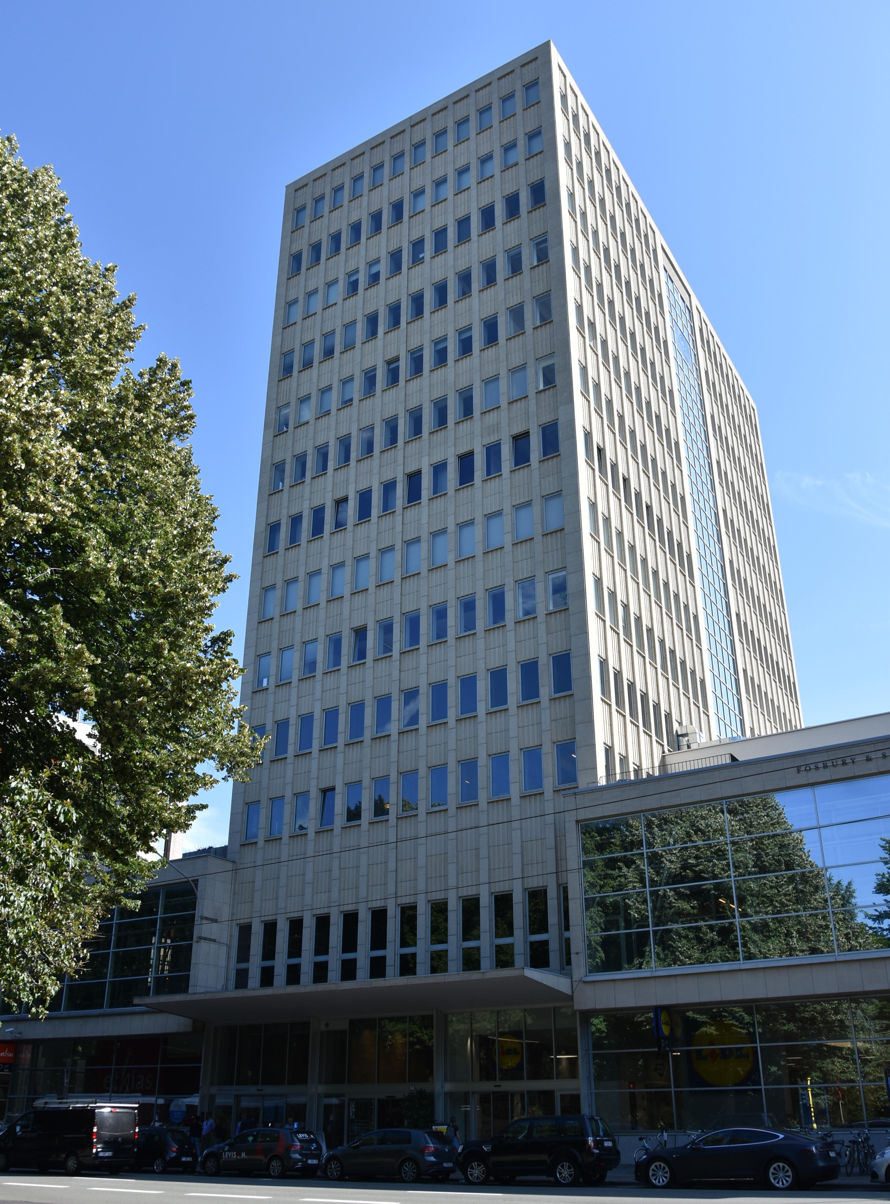 Léon Stynen Kantoorgebouw E.B.E.S. Mechelsesteenweg 271-273 Antwerpen (7329) 29-07-2019 10-23-06 This photo of immovable heritage has been taken in the Flemish Region